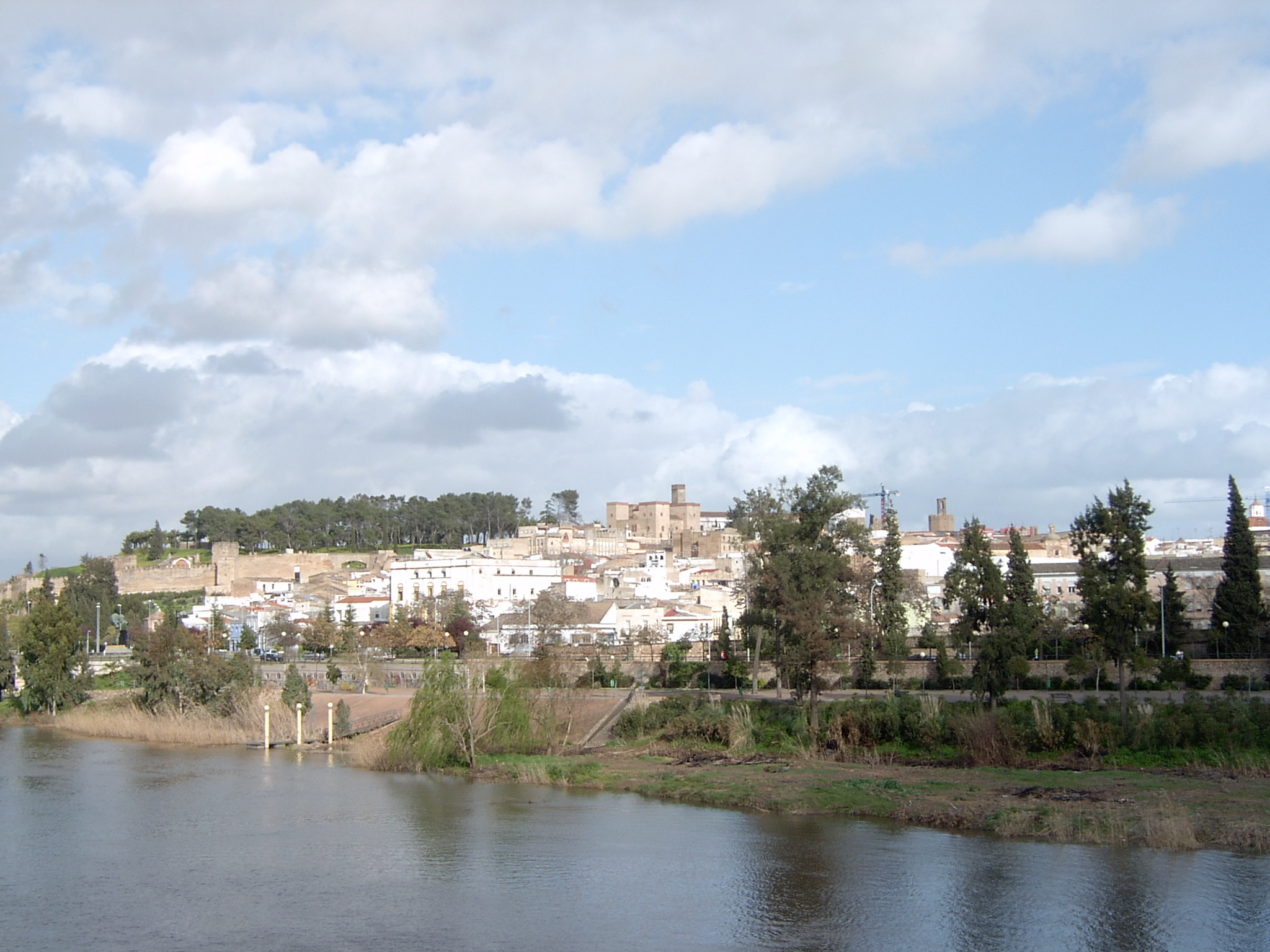 Panoramica de de la alcazaba de Badajoz.